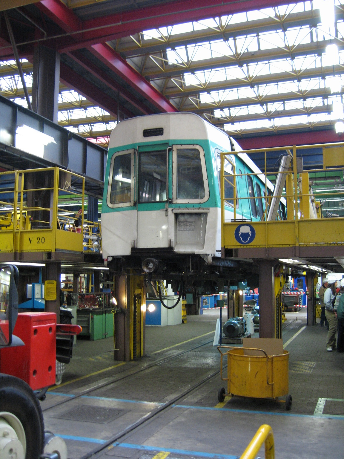 MF 77 sur vérins à l'Atelier de Maintenance Patrimoniale / JPO Ateliers de Saint-Ouen 06/06/2009.